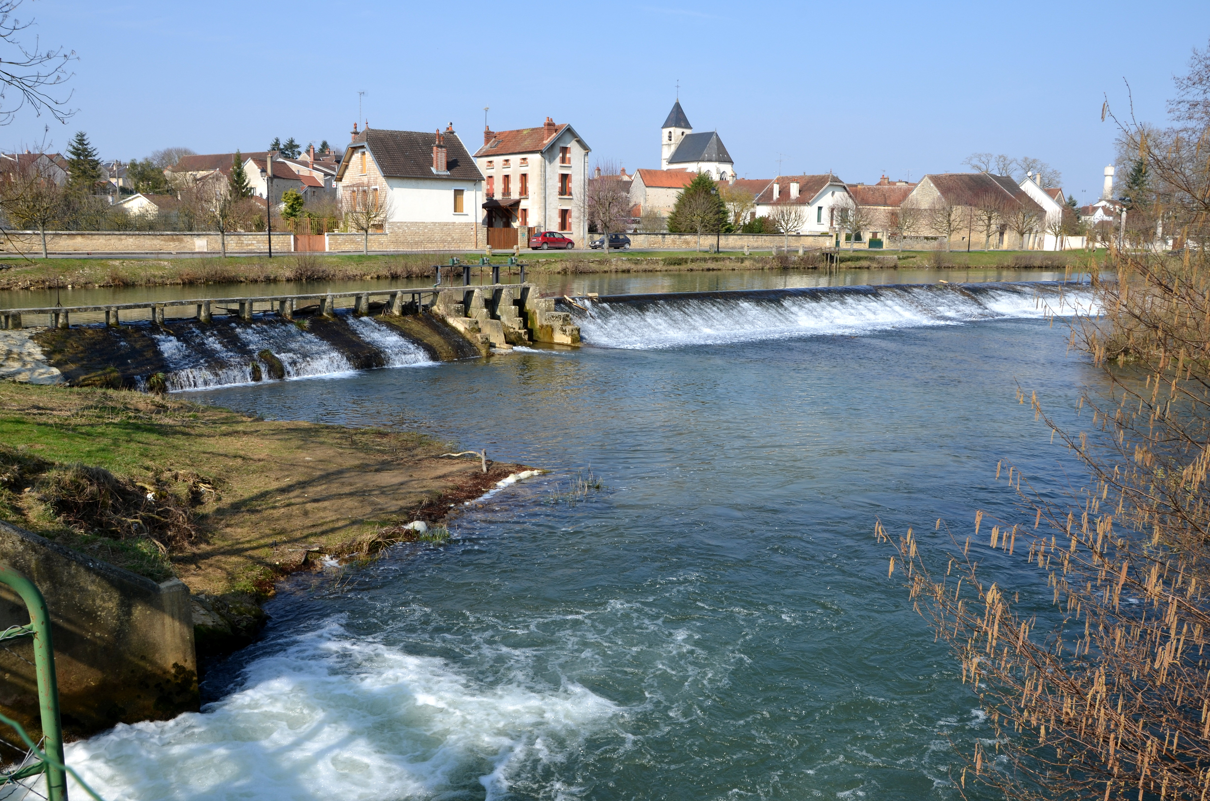 L'Armançon a Nuits, Yonne, Bourgogne, France